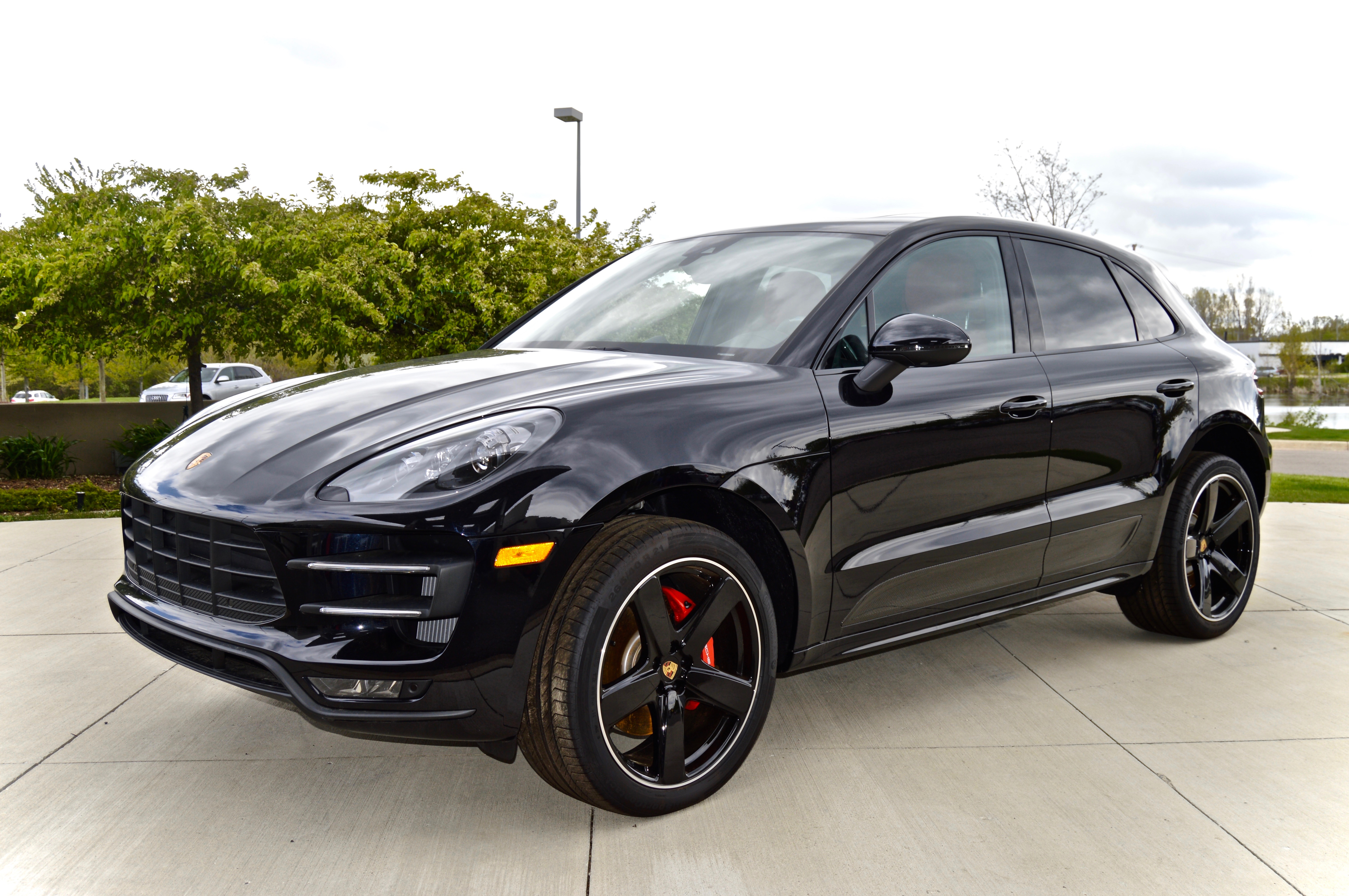 Porsche Macan Turbo